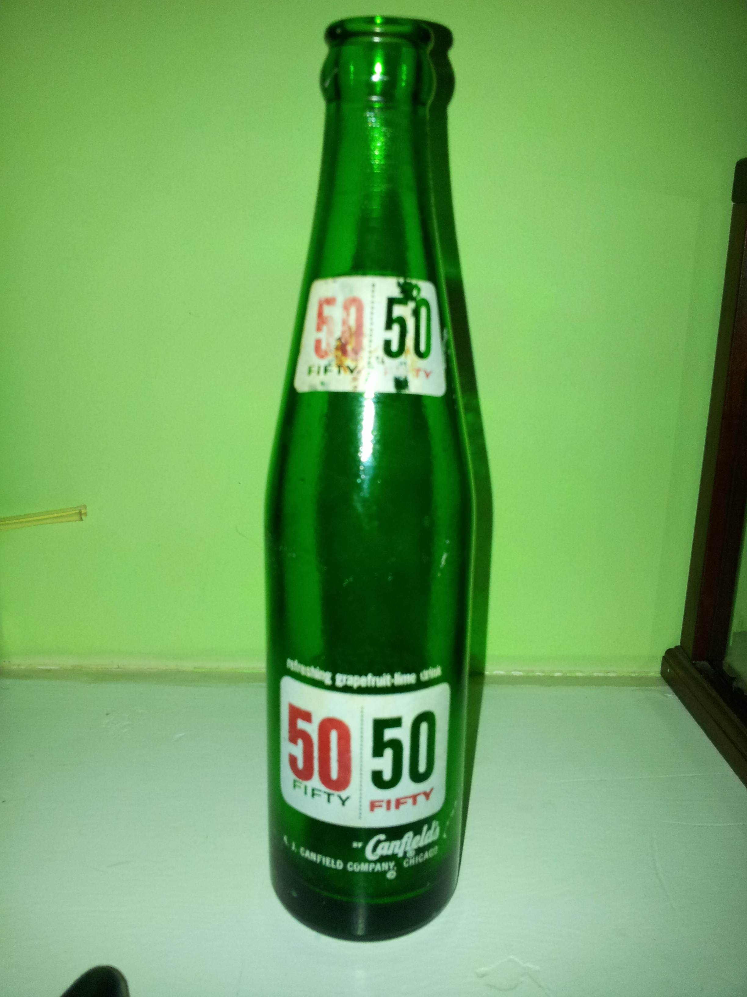 50 50 Soda Bottle